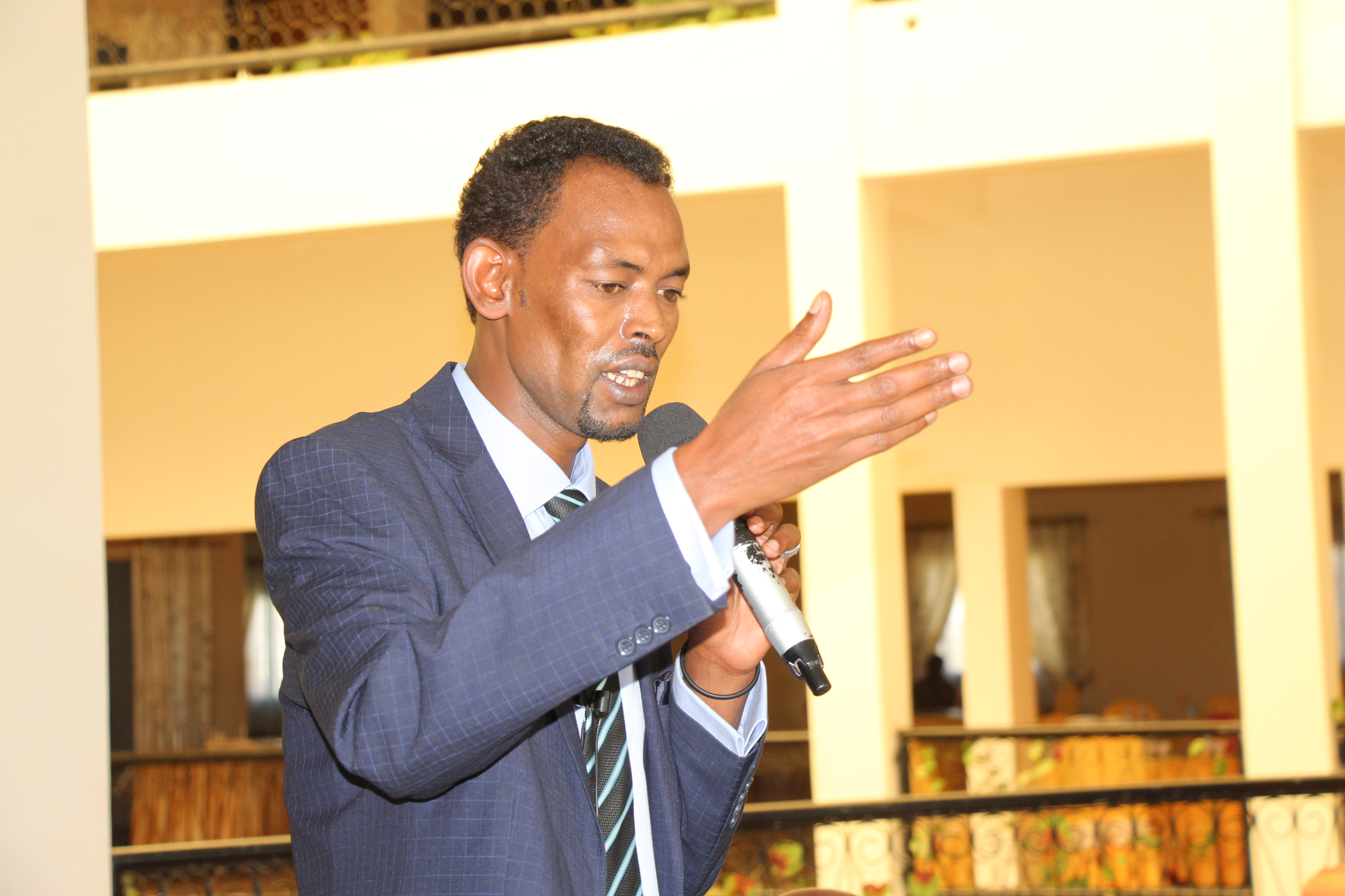 Soomaaliga: Madashii Hadhimo Sharafta Xidigaha Geesku U Sameeyeen Safiir Ayaan Cashuur.